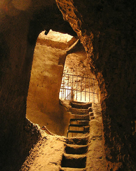 foto dal sito - inserita direttamente dal webmaster